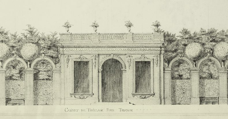 Projet de l'architecte Ange-Jacques Gabriel pour le « Cabinet de treillage » devant être dressé dans Nouveau Jardin du Roi à Trianon - in Le Petit-Trianon, Histoire et description, Gustave Desjardins, 1885, planche V, p. 6-7